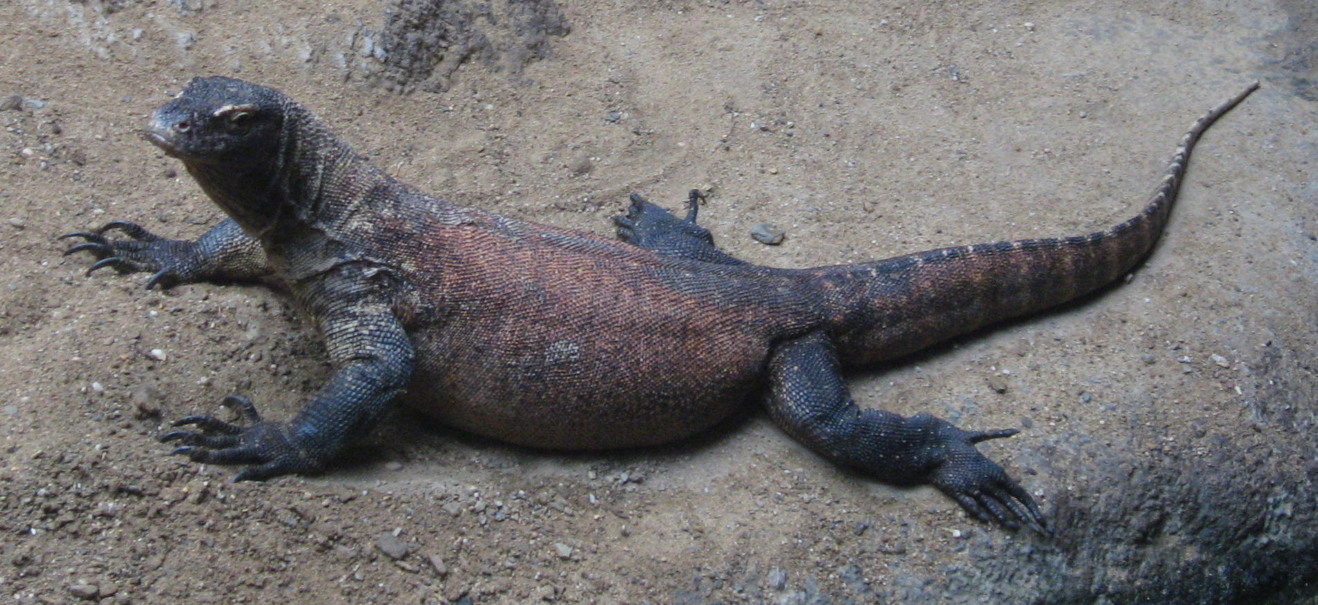 Varanus komodoensis